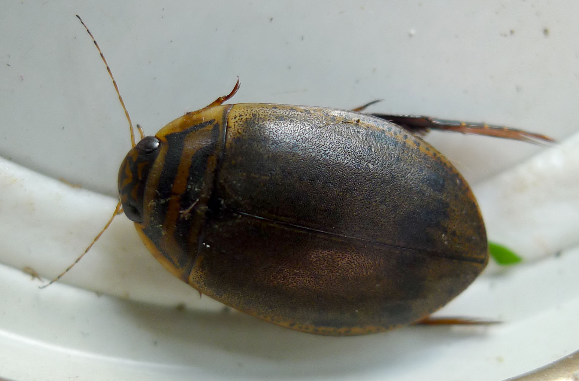 Acilius sulcatus. Diving Beetle